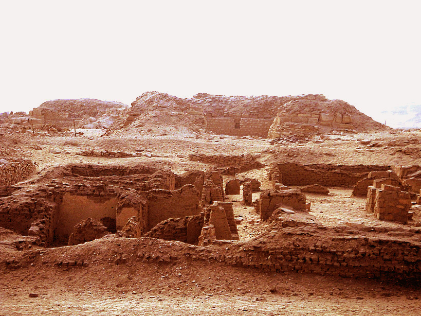 Pyramid of Khentkaus II, Lepsius XXV Pyramid and Lepsius XXV Pyramid. Abusir.